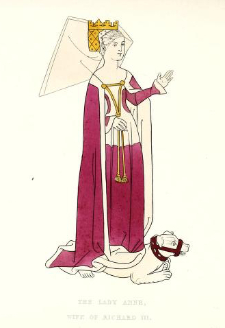 Anne Neville